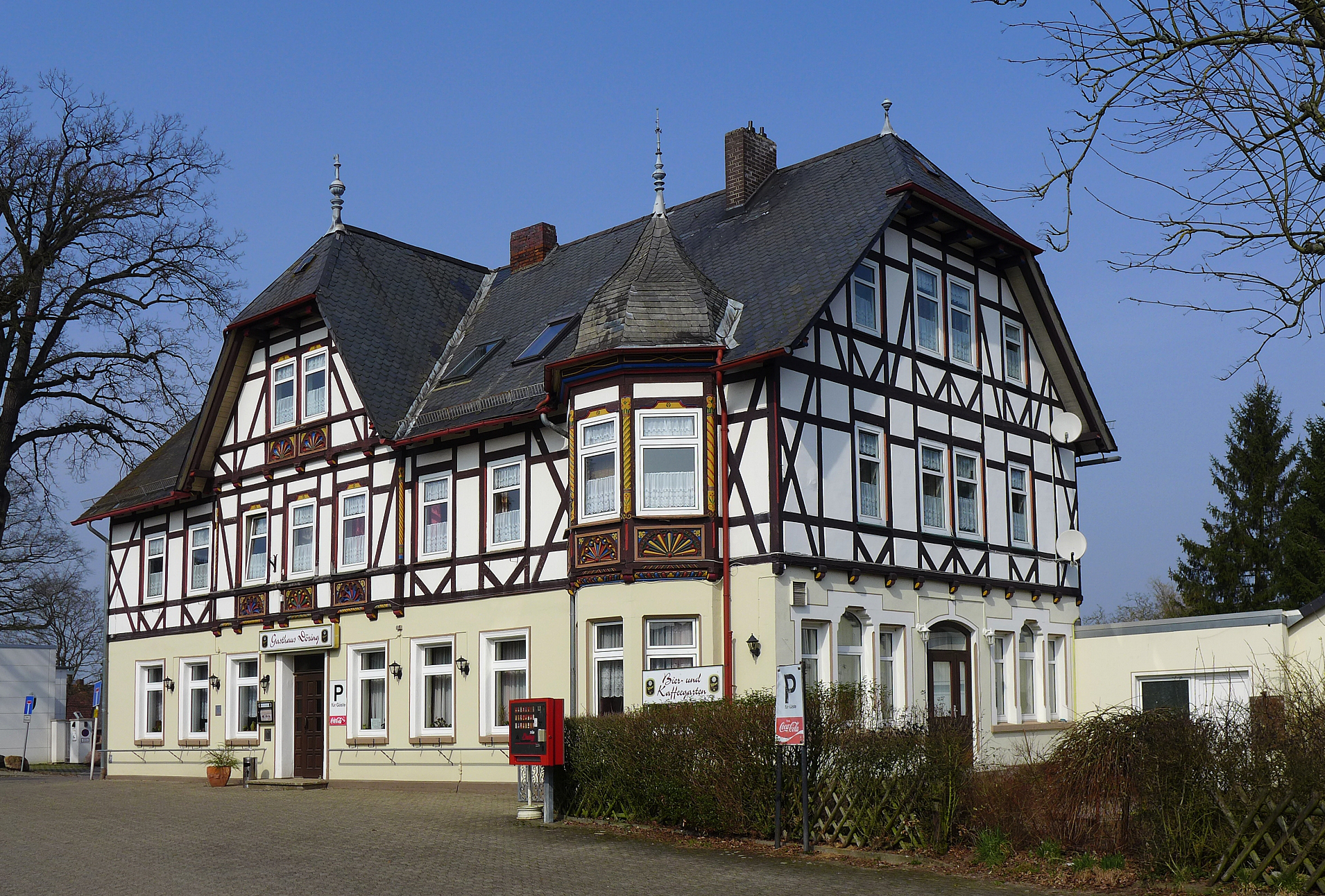 Gasthaus im Fachwerkbau am Amtsweg von Hankensbüttel, Aufnahme März 2015.